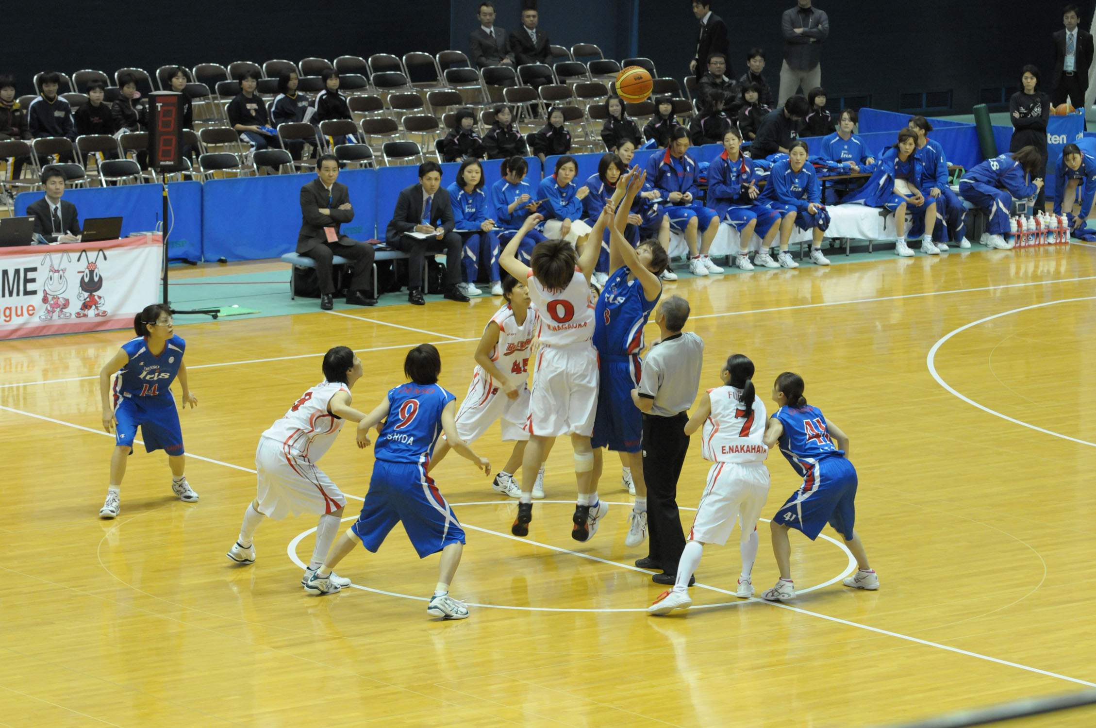 WJBL 13-14レギュラーリーグ、富士通対デンソー。美郷総合体育館リリオス。